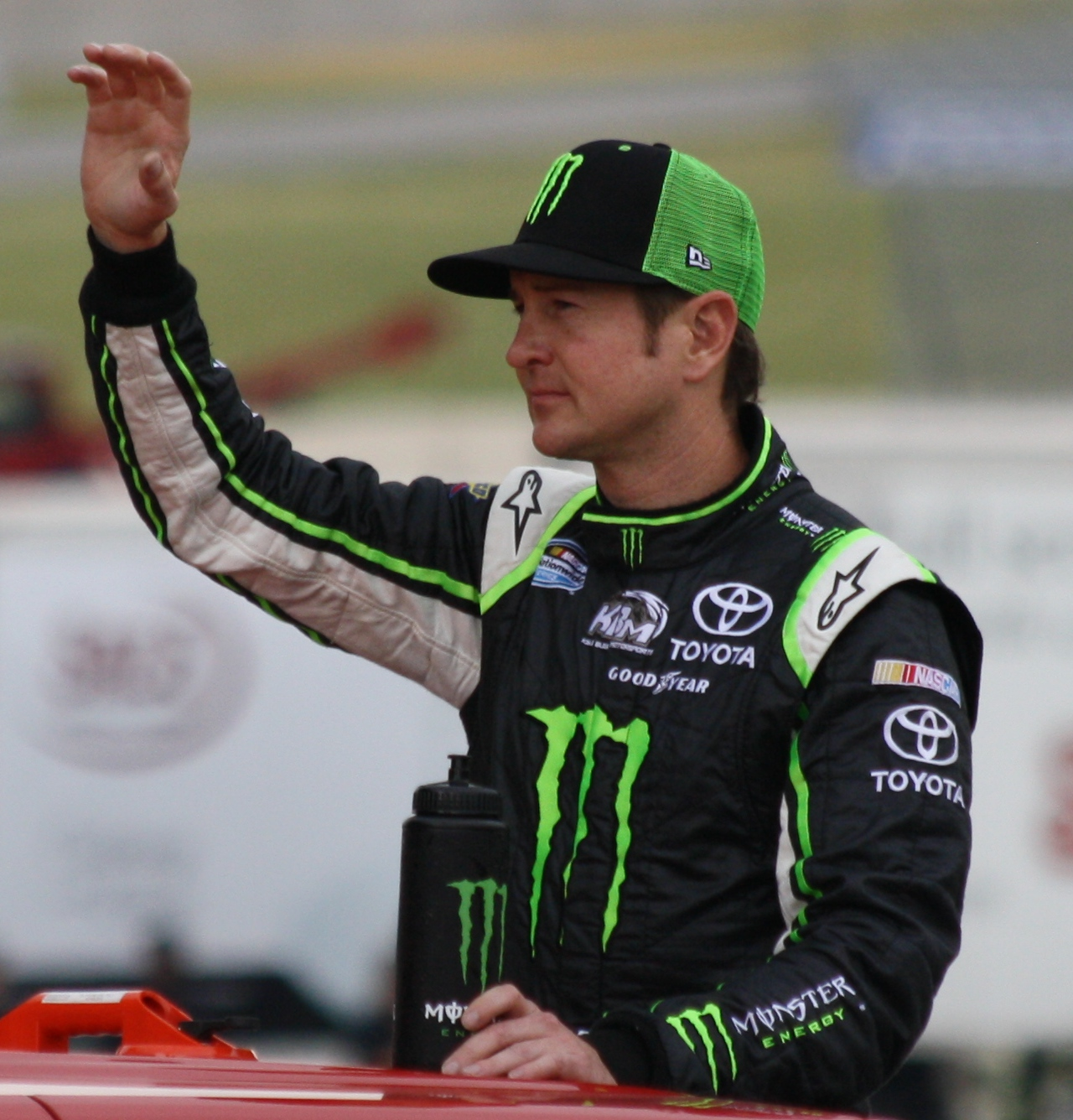 NASCAR driver Kurt Busch during 2014 Aaron's 499